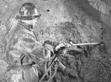 Atlas Copco: Provgruvan 20 meter under jord i Sickla Industriområde.